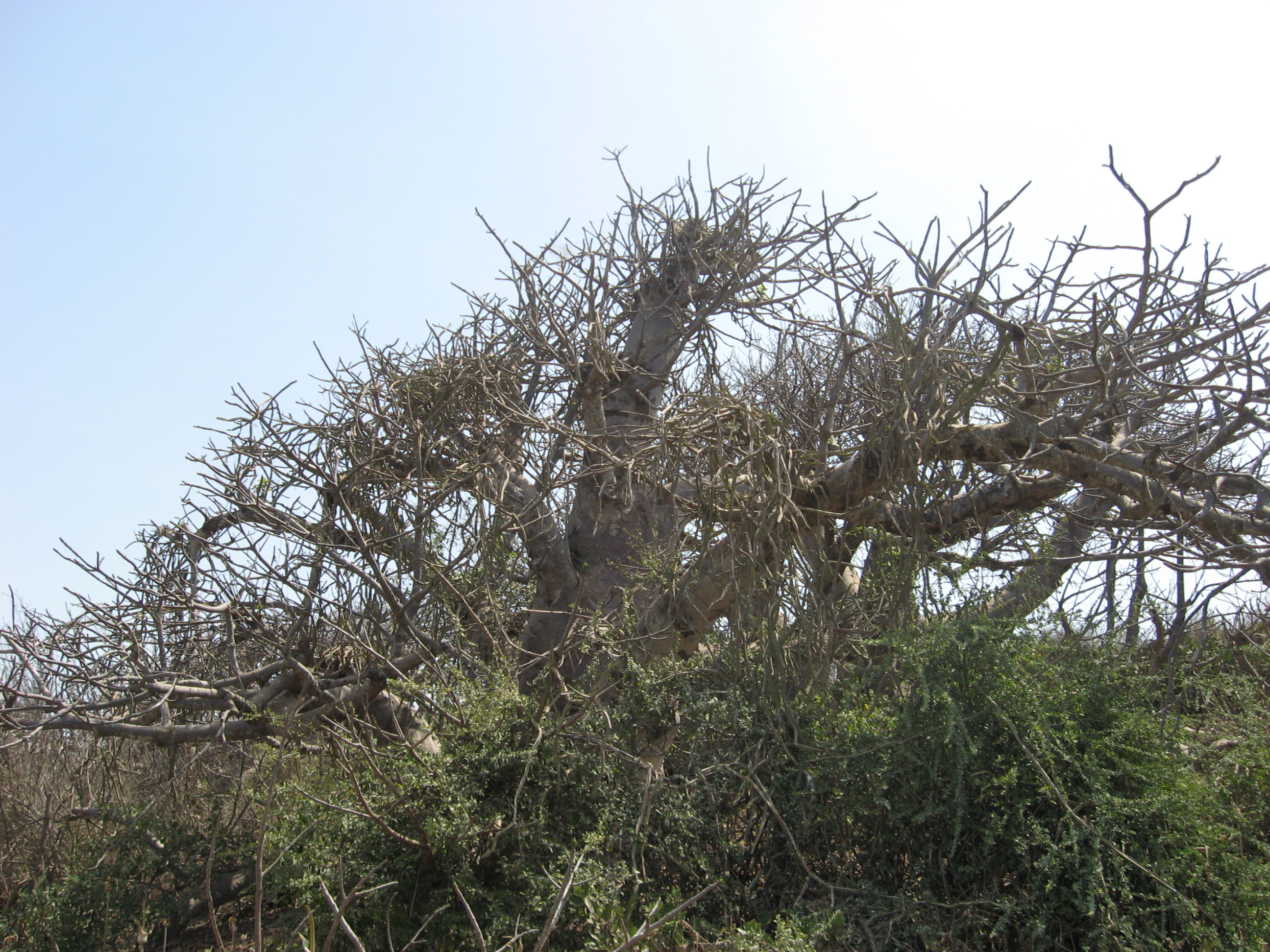 Epineux sur les îles de la Madeleine (Dakar, Sénégal)